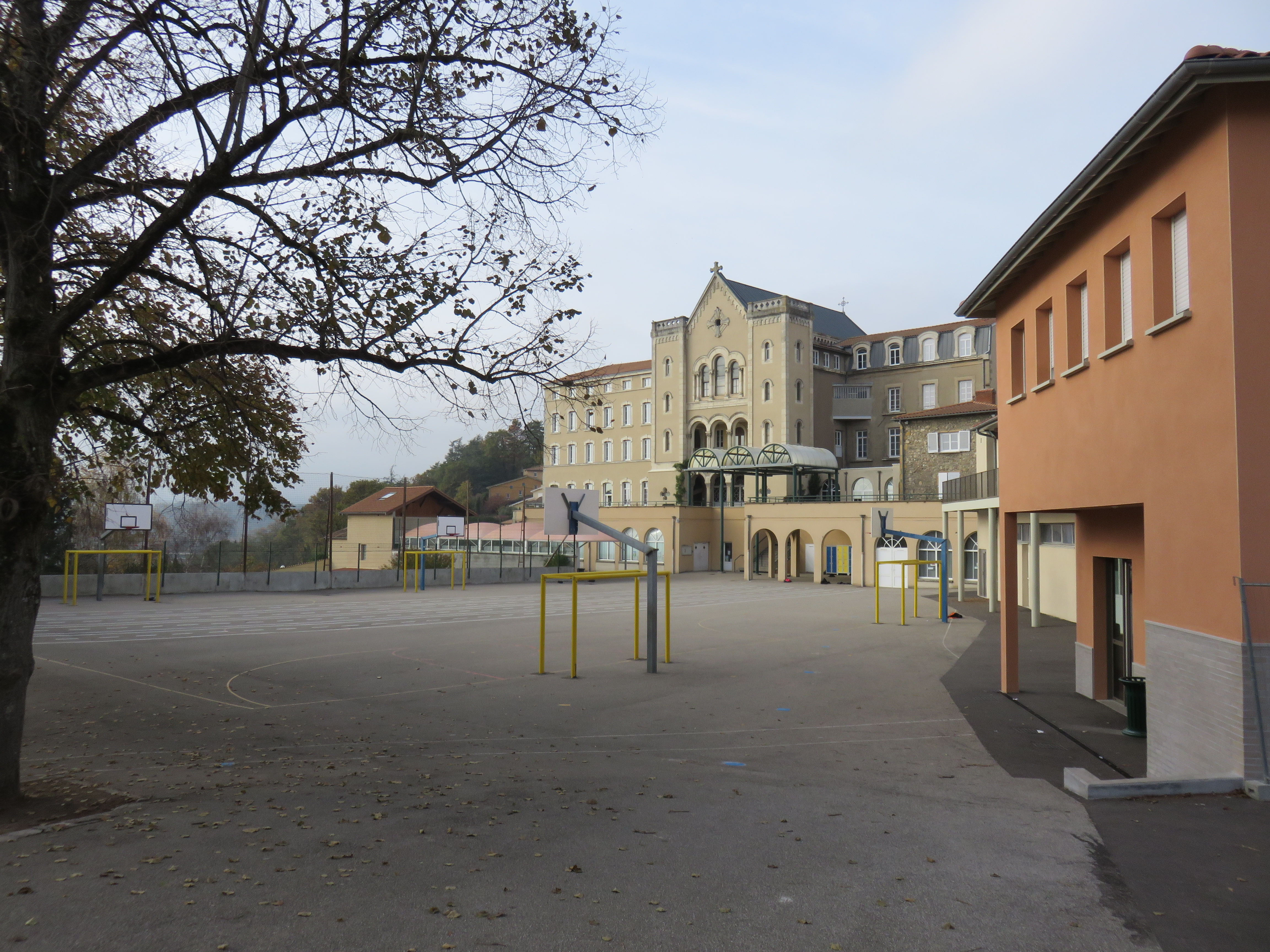 Institution Louis Querbes à Vourles (Rhône, France).